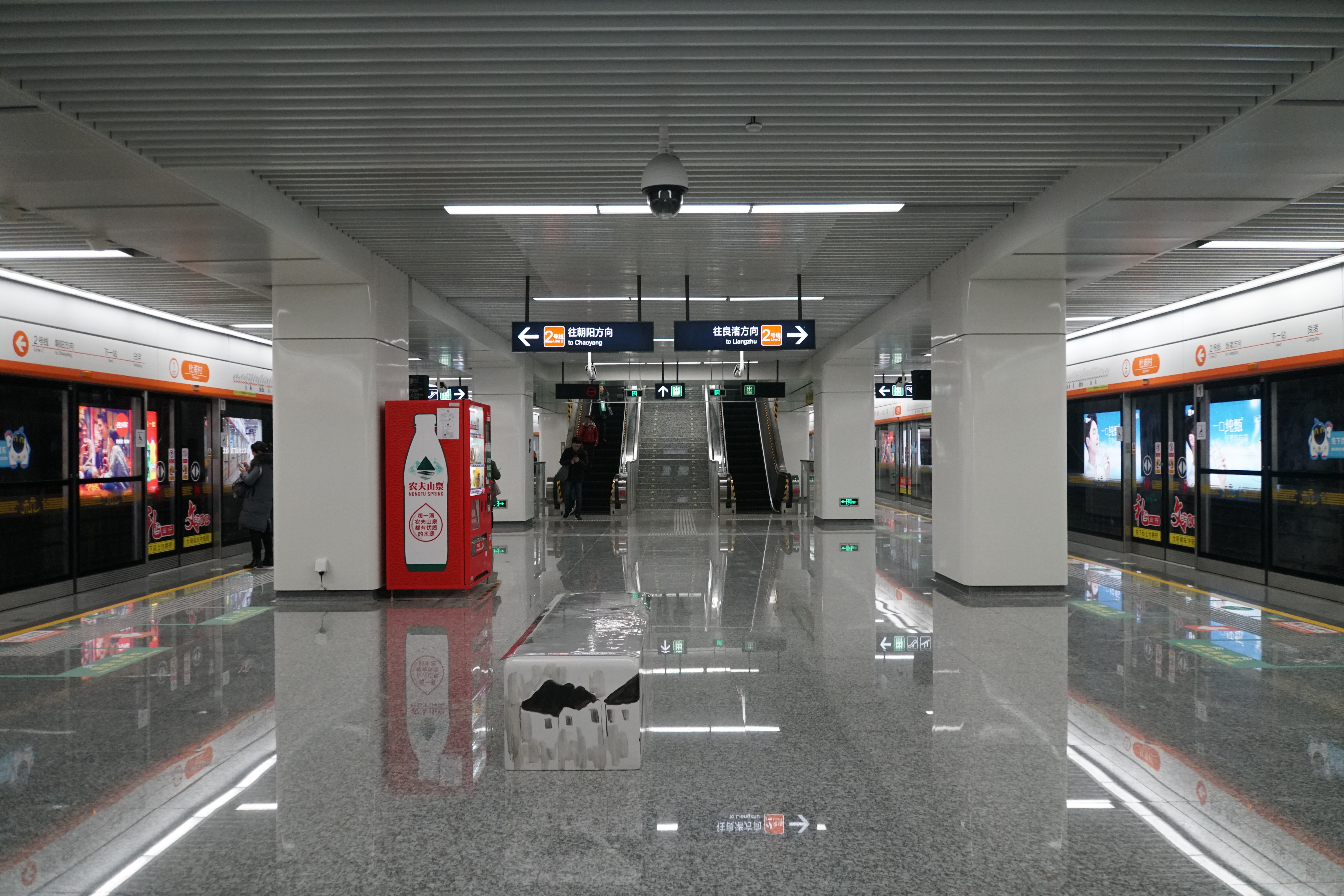 杜甫村站站台